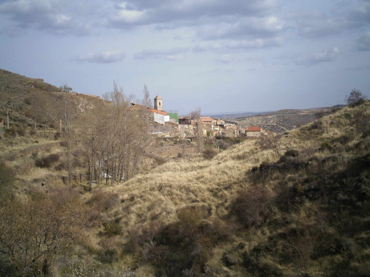 Valdemadera - La Rioja (Spain)